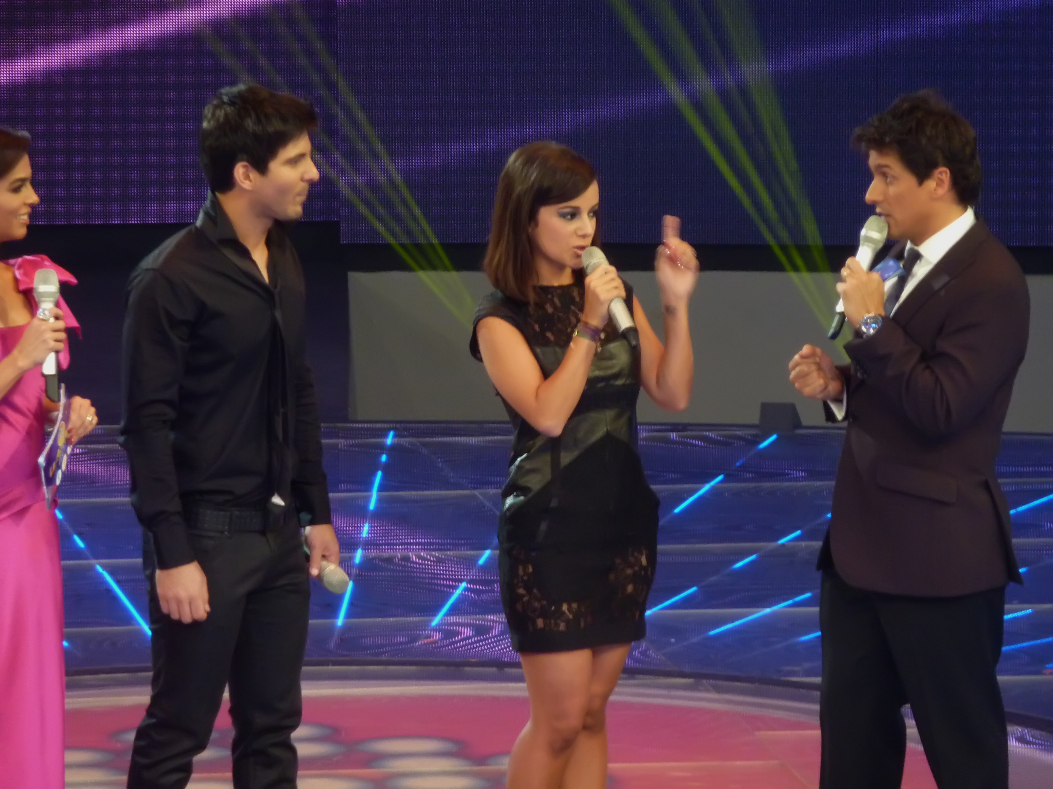 Alizée despues de su interpretacion "J'en ai marre"